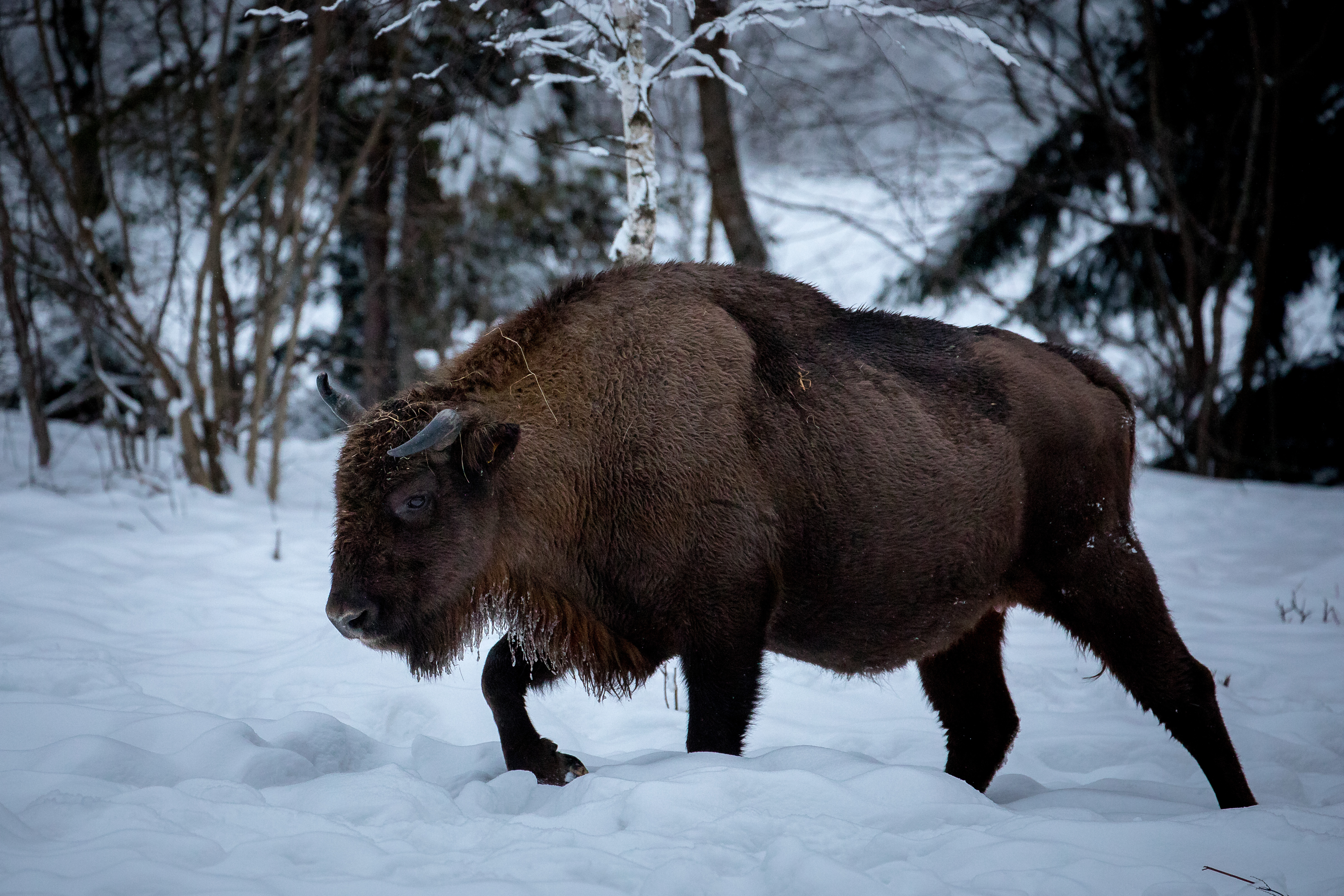 Зубрів завезено у Сколівські Бескиди у рамках програми "Відновлення популяції зубра європейського в українській частині Східних Карпат"